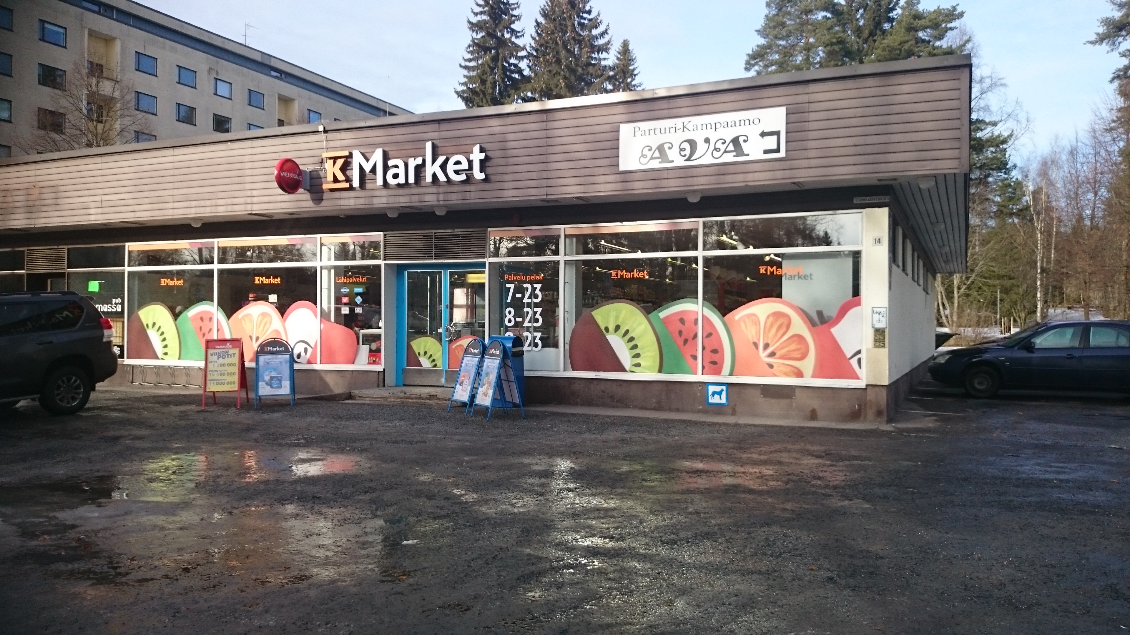 K-Market Tesomajärvenkatu